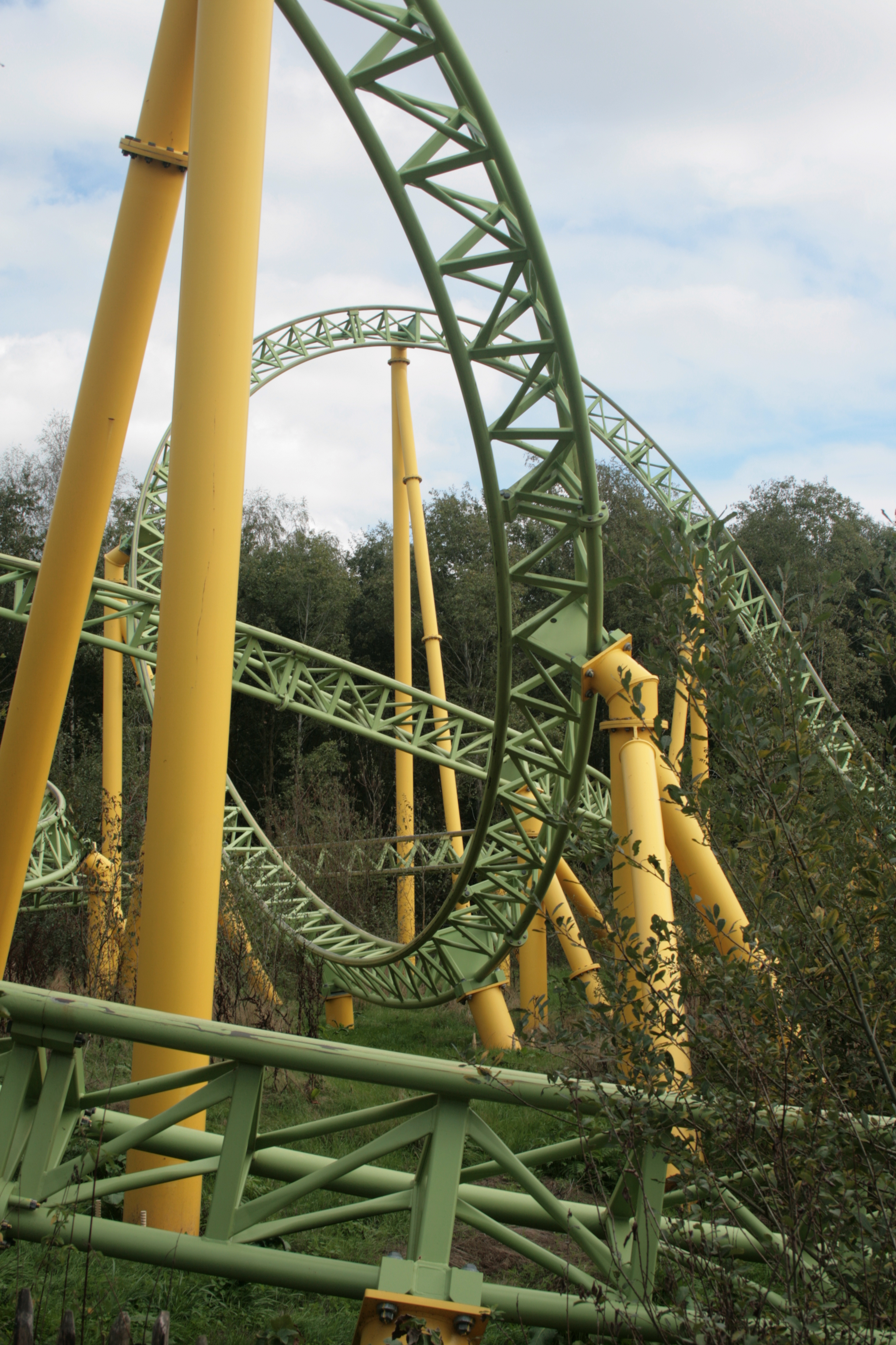 Traject van achtbaan Dwervelwind in Attractiepark Toverland.